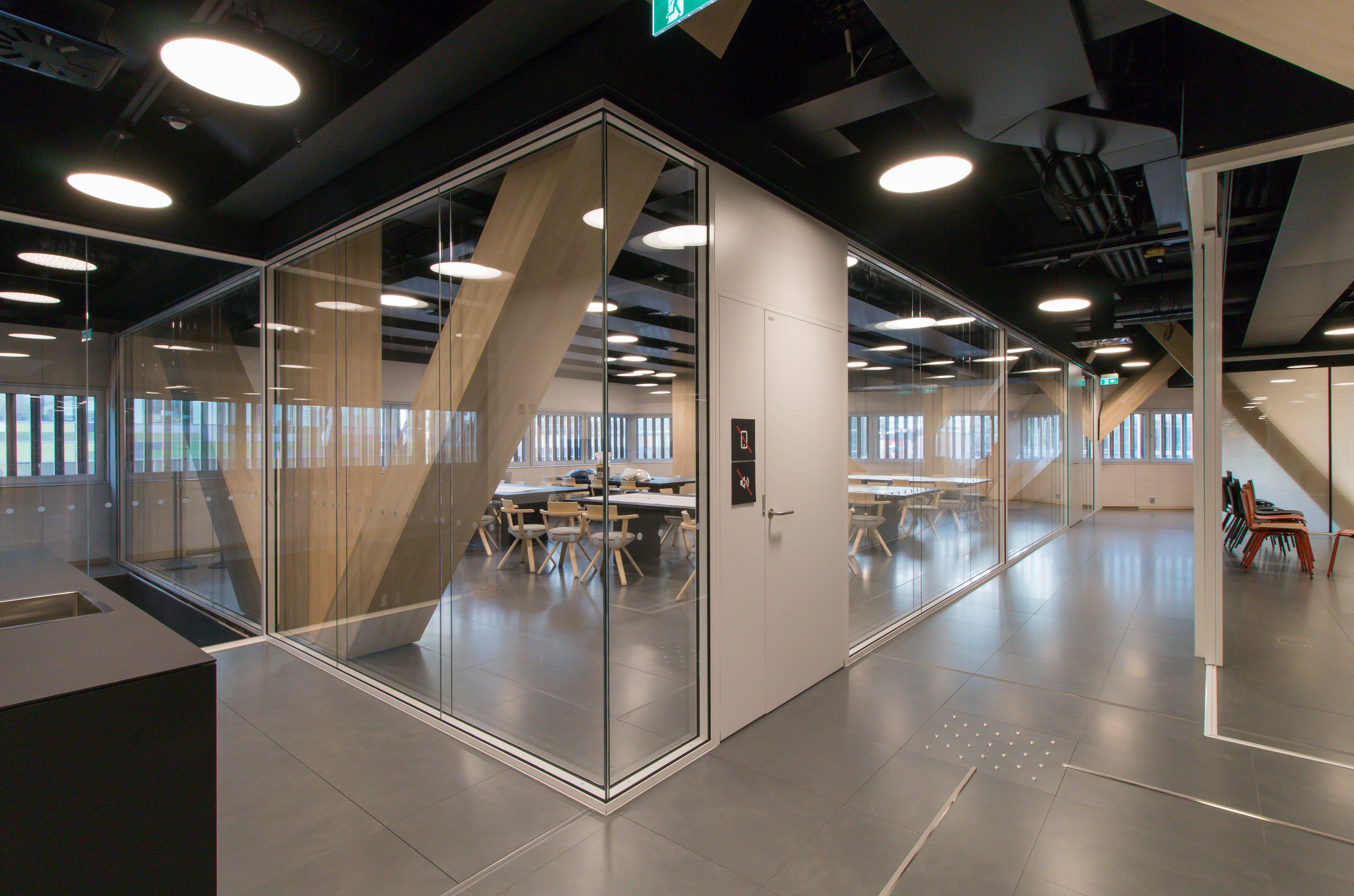 Oodissa Inlook teki kokoustilojen liuko-ovia ja lasisia väliseiniä käyttäen myös älylasiseinää.